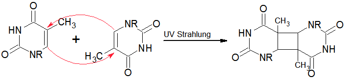 Thymindimerbildung